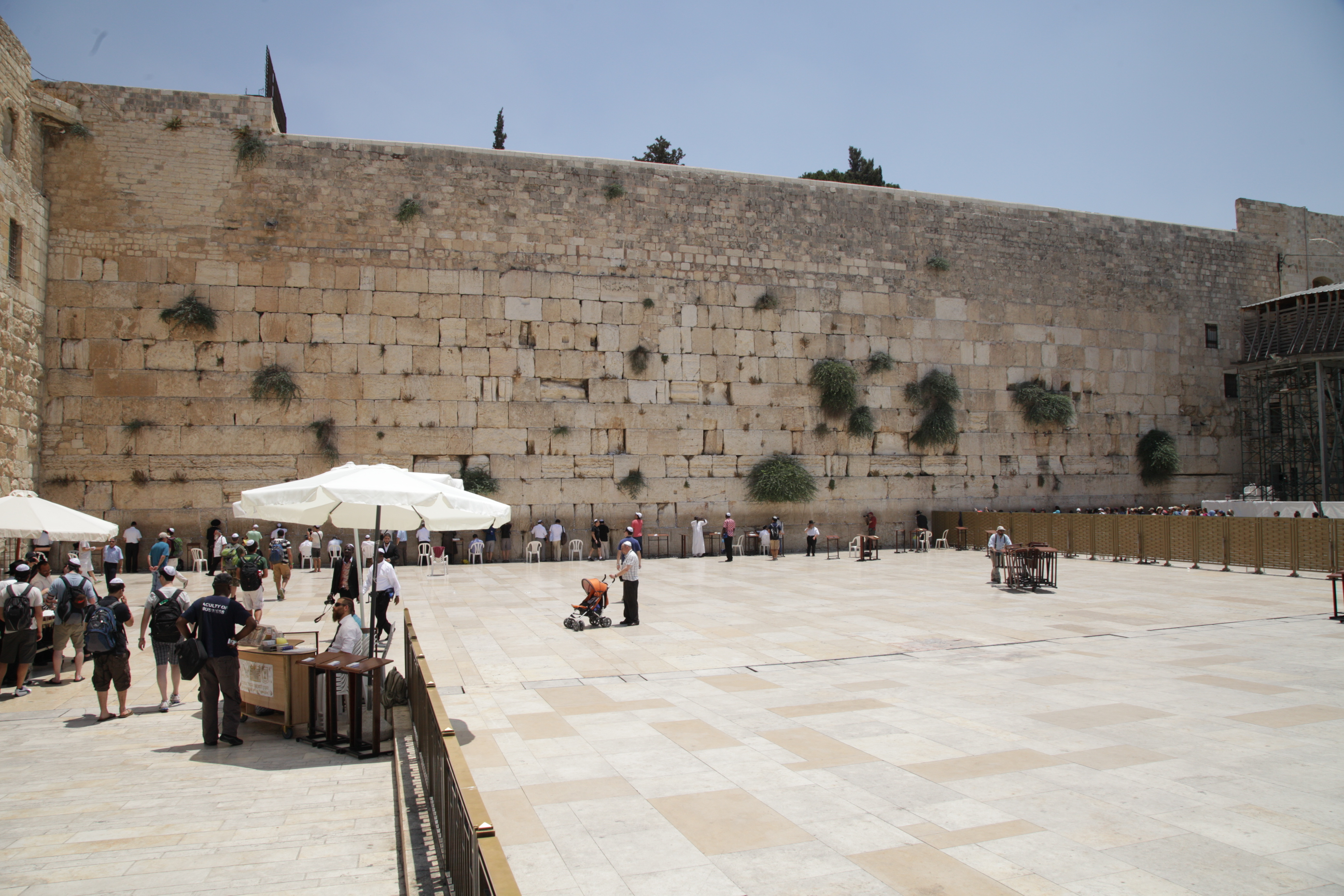 Le western wall (murs des lamentations). Partie visible de l'extérieur. Jerusalem 07/2012